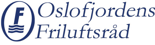 Logo, versjon fra 2013